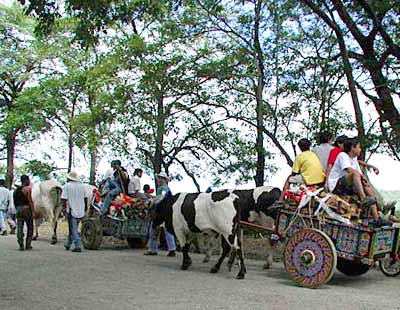 Esta imagen fue tomada en el 2001 por un estudiante de intercambio estadounidense. En el desfile de la Pica e' Leña, los marchantes y las carretas de bueyes viajan con leña recién cortada hacia el centro de la ciudad, donde es ofrecida para las celebraciones del día de la aparición de la Virgen de Guadalupe. La imagen original se encuentra en